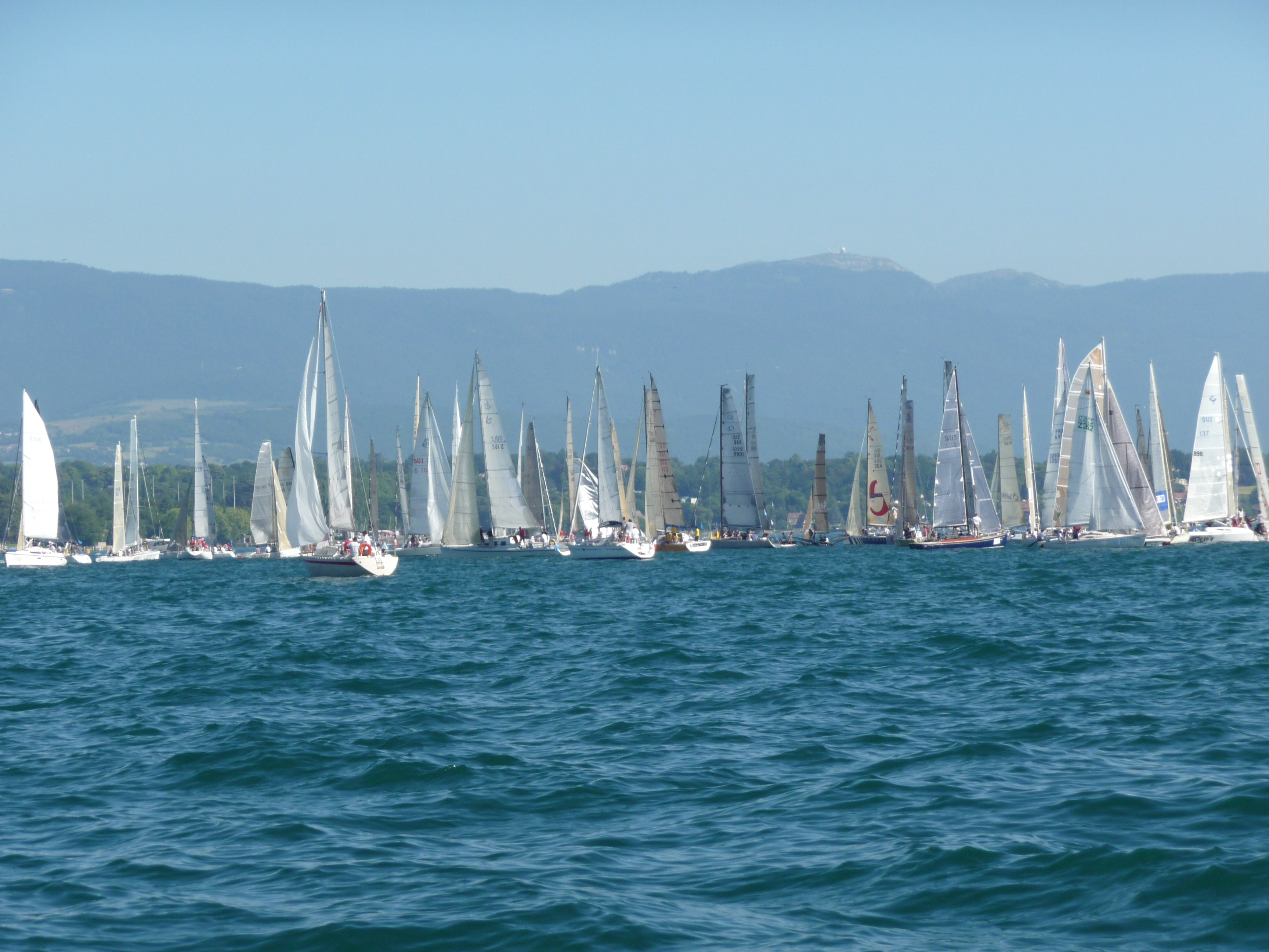 Bol d'Or 2009